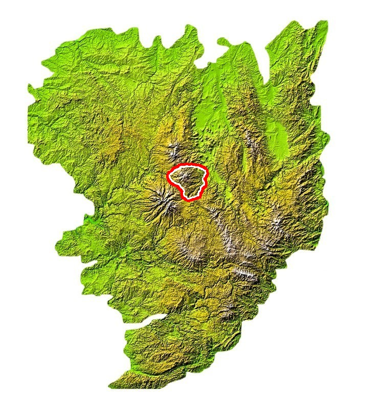 Le Massif Central et les Monts du Cézallier